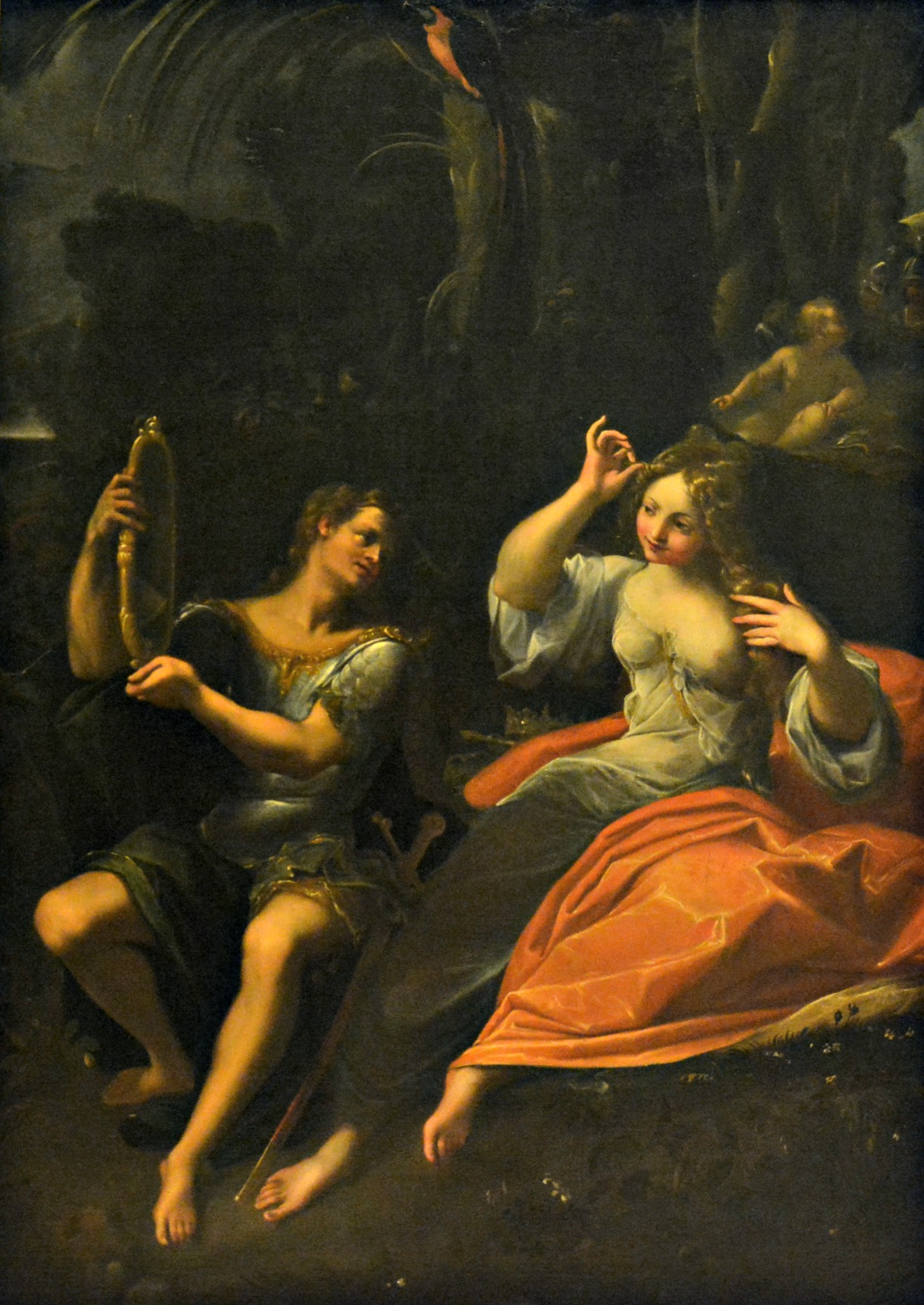 Vedi titolo